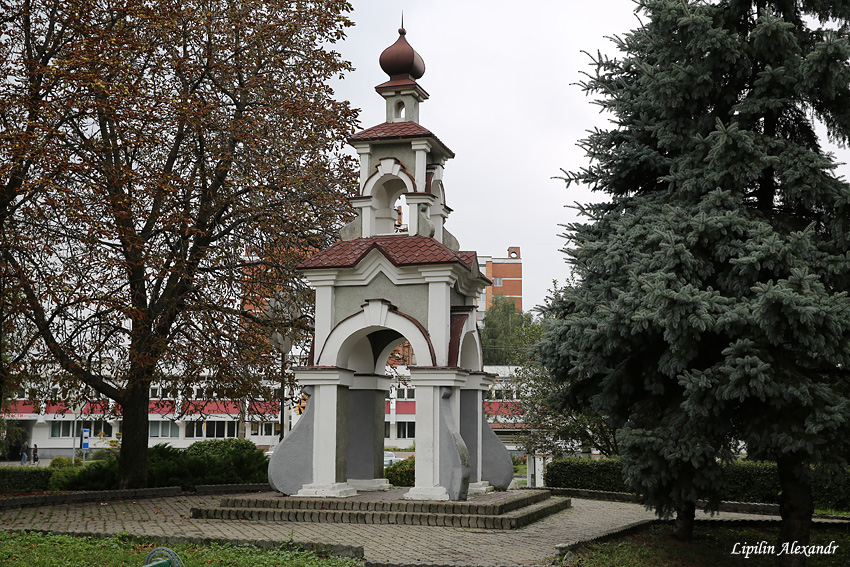 Пінскае гарадзішча